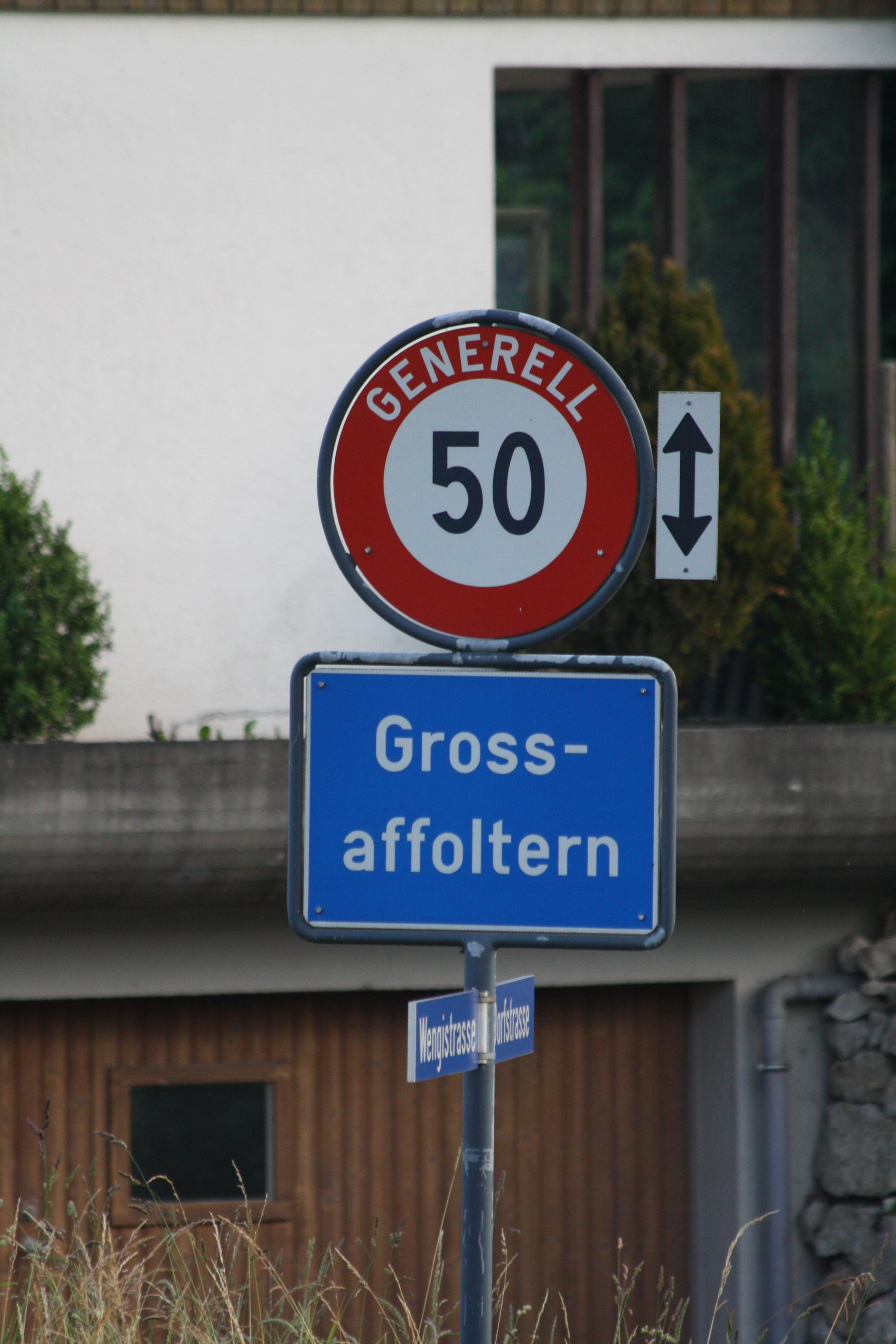 Ortstafel von Grossaffoltern